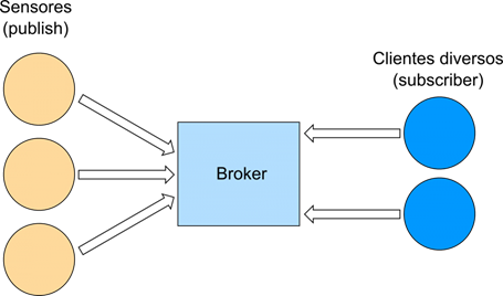 Diagrama padrão do modelo publish-subscriber utilizado pelo MQTT Broker